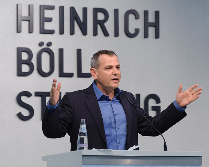 Nitzan Horowitz (Journalist, Knesset-Abgeordneter New Movement Meretz) Konferenz: Fremde Freunde?